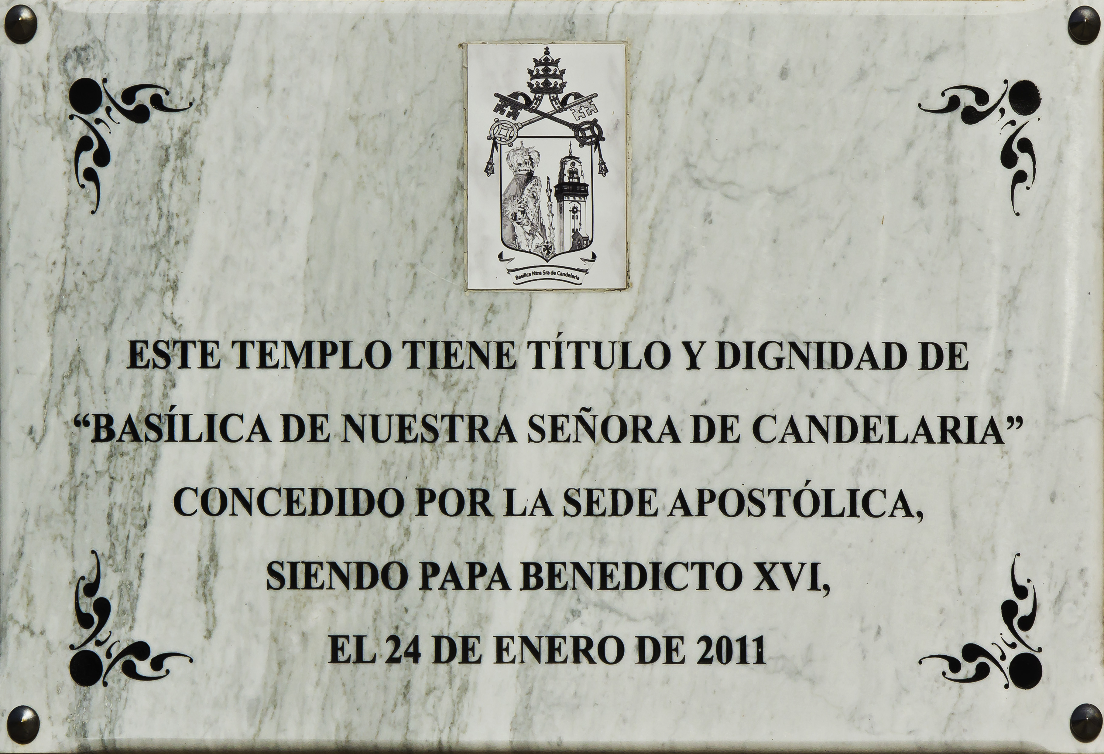 Informationstafel an der Basílica de Nuestra Señora de la Candelaria